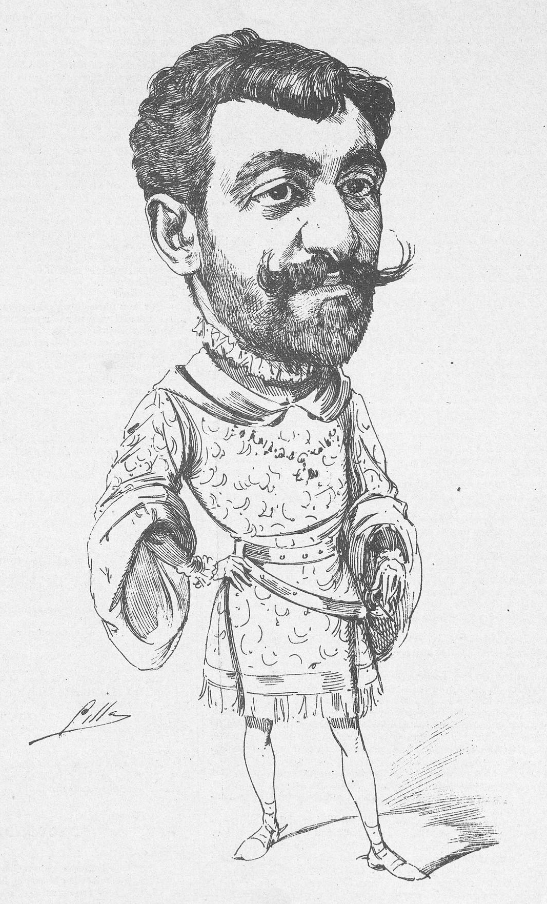 Ignacio Tabuyo.